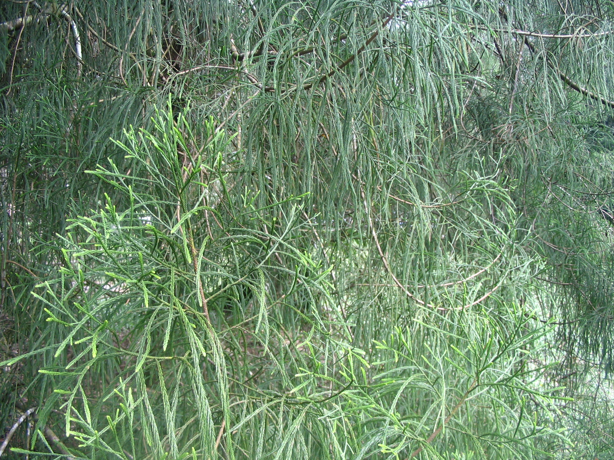 Dacrydium beccarii, planté au Forest Research Institute Malaysia , Kepong, Selangor.